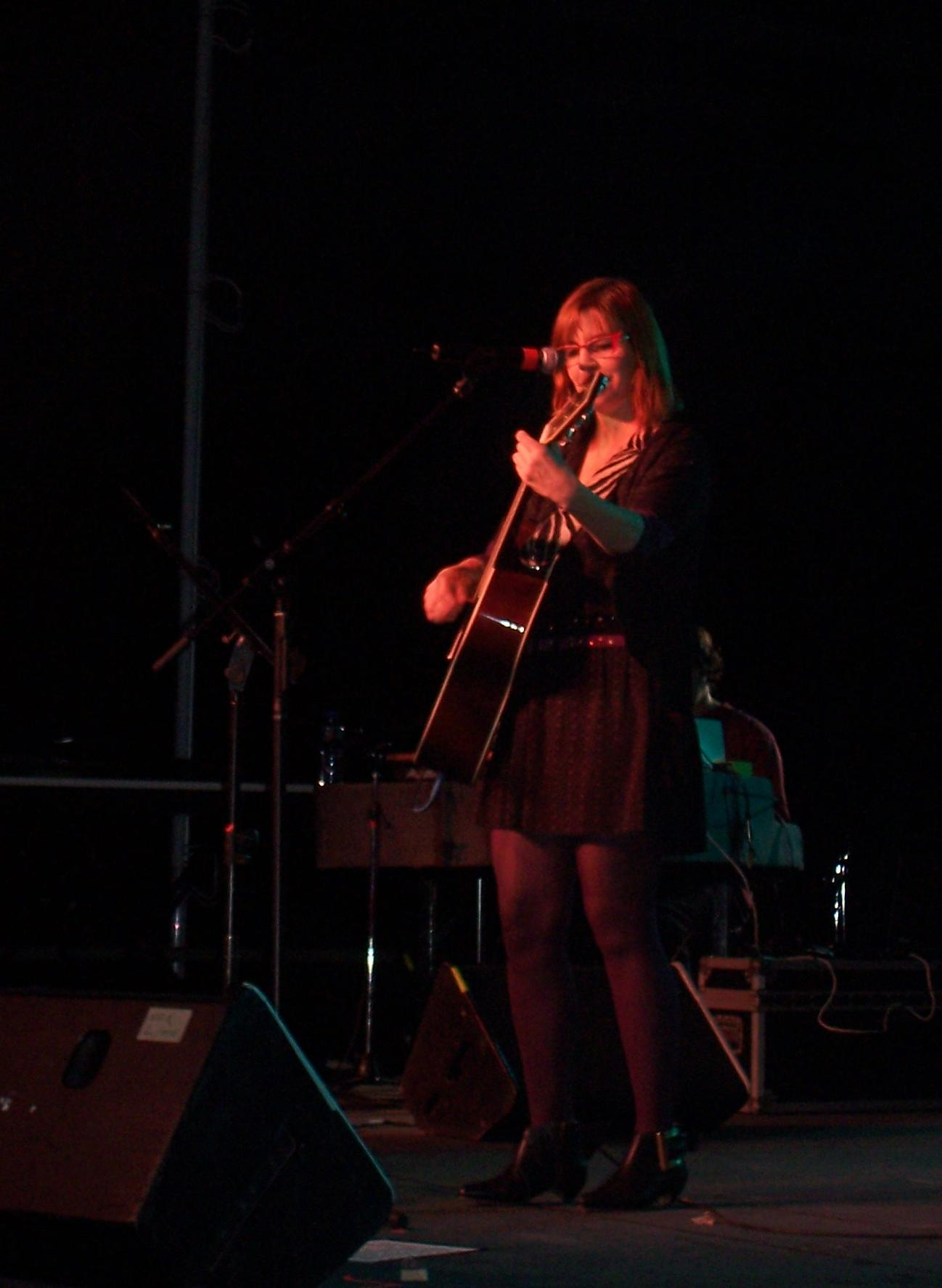 La cantante argentina Fabiana Cantilo en la 3ra Feria Internacional de la Música (Bafim) en Buenos Aires. Año 2008.